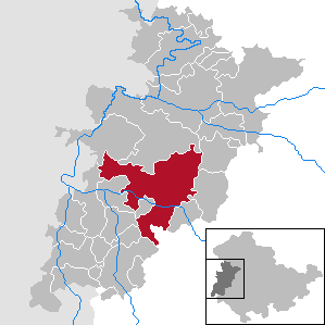 Bad Salzungen in Thuringia - Wartburgkreis